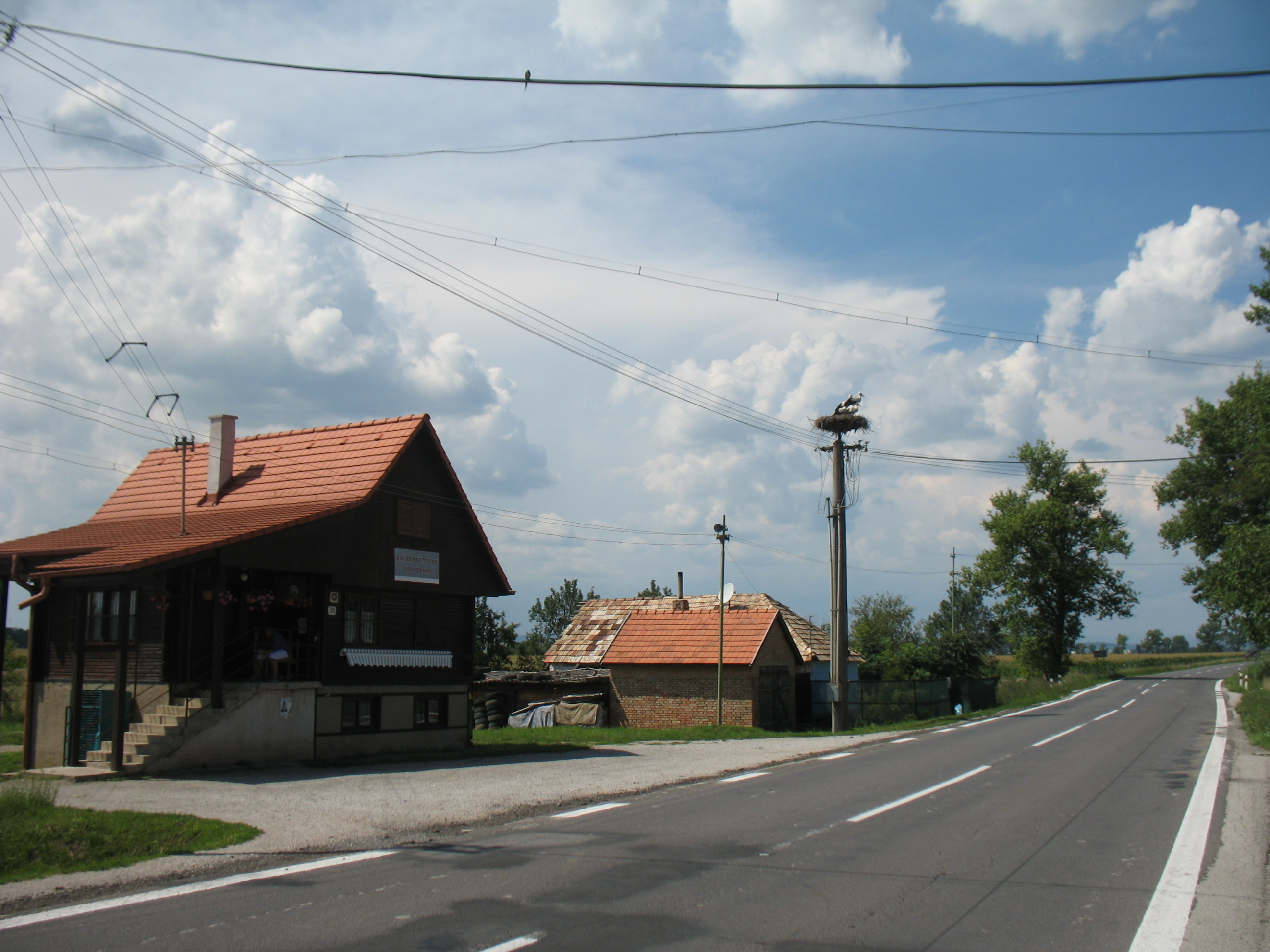 Méhi gólyafészekSlovenčina: Včelince